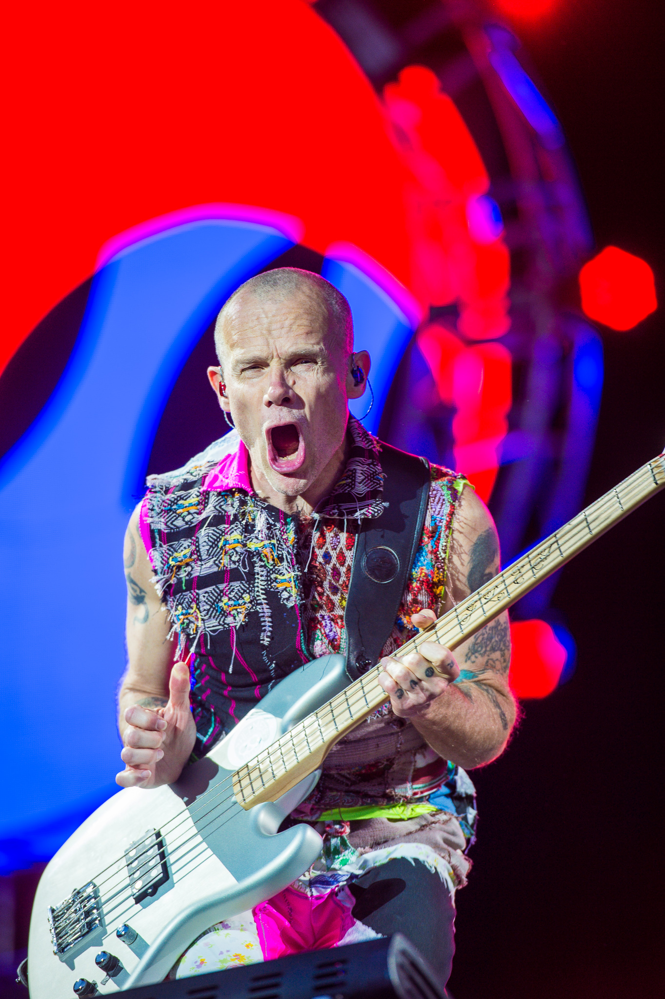 ARGO-Konzerte,Festival,Konzert,Livekonzert,Livemusik,Michael „Flea“ Balzary,Musik,Red Hot Chili Peppers,RiP,Rock im Park 2016,Seat Zeppelin Stage